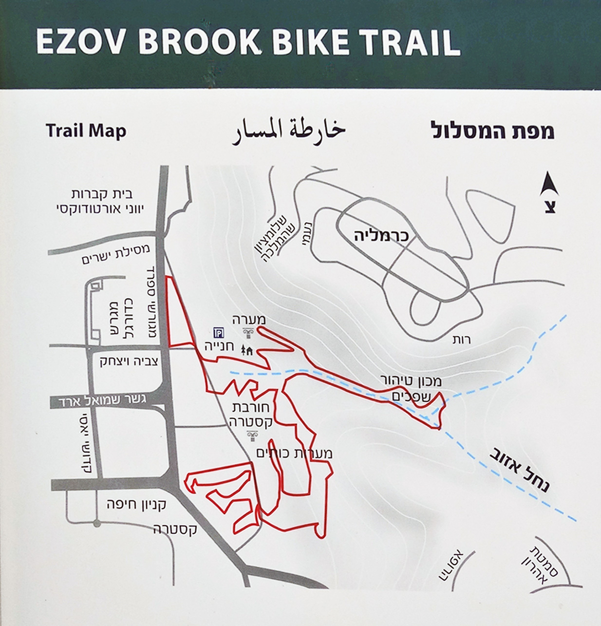 Wadi Ezov, Haifa, Israel. נחל אזוב בכרמל